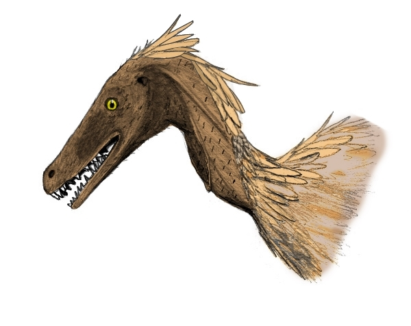 Profile of Tsaagan mangas